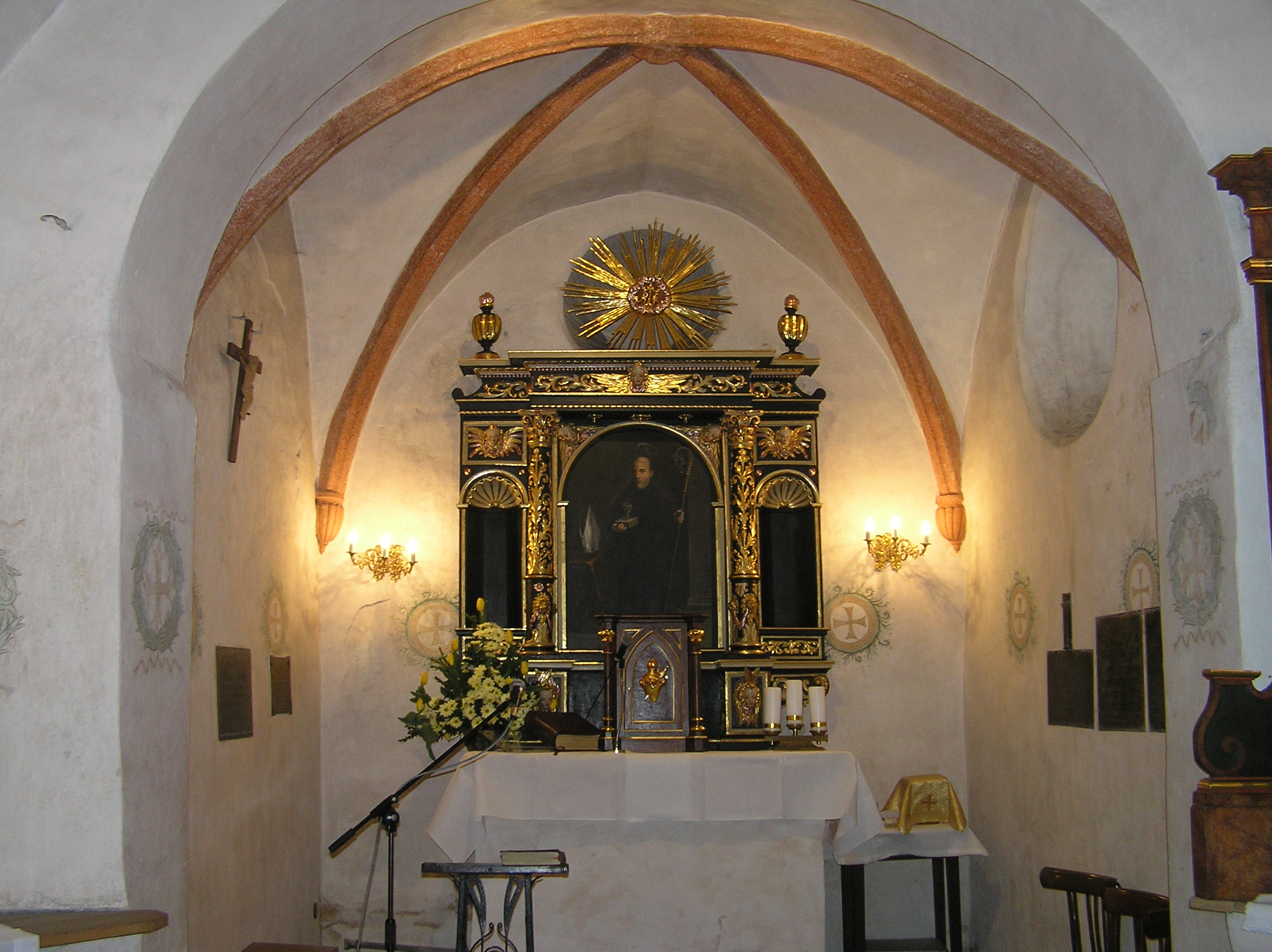 Kraków - Kościół św. Benedykta - inside